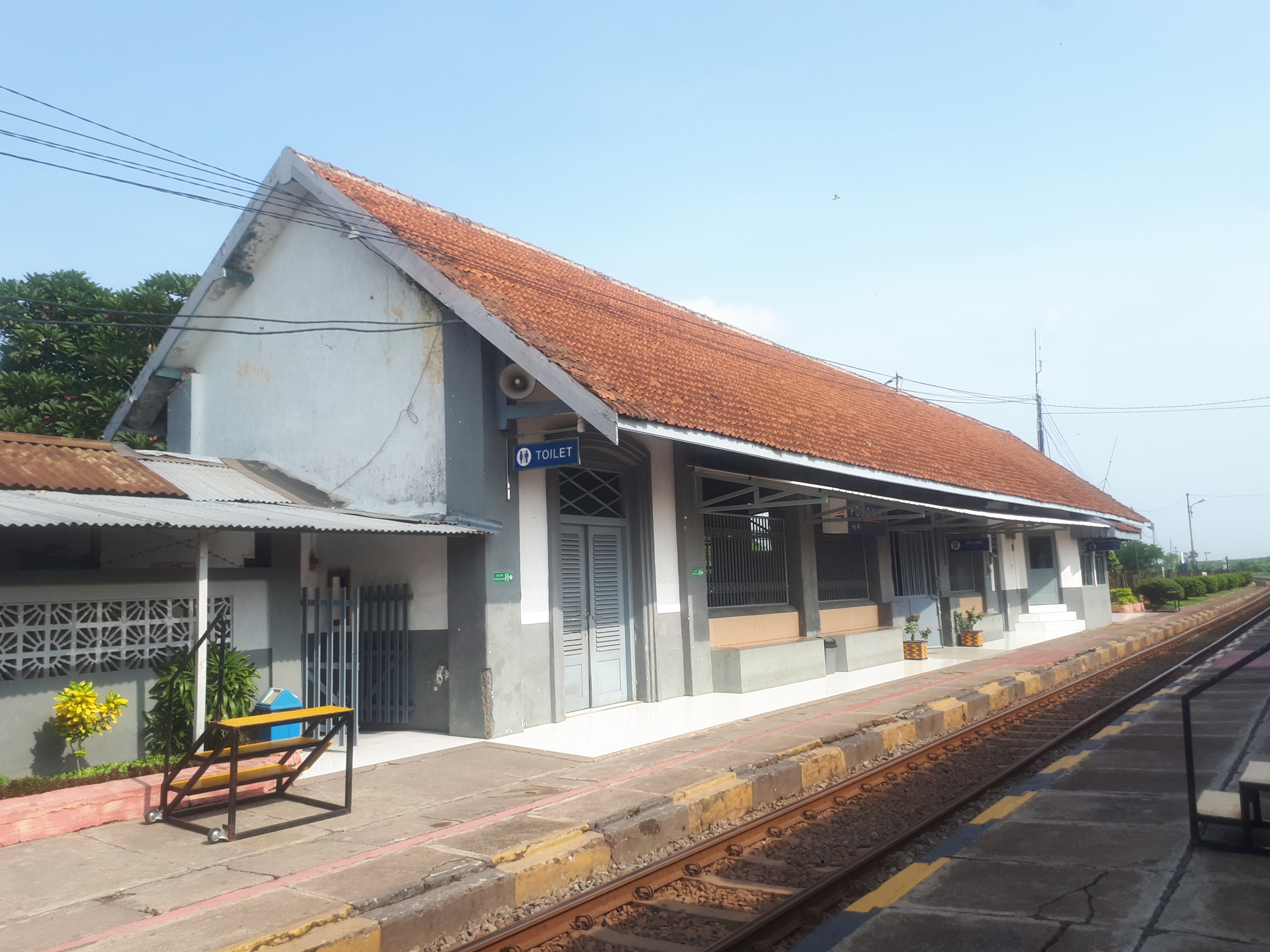 Stasiun Porong pada tahun 2020